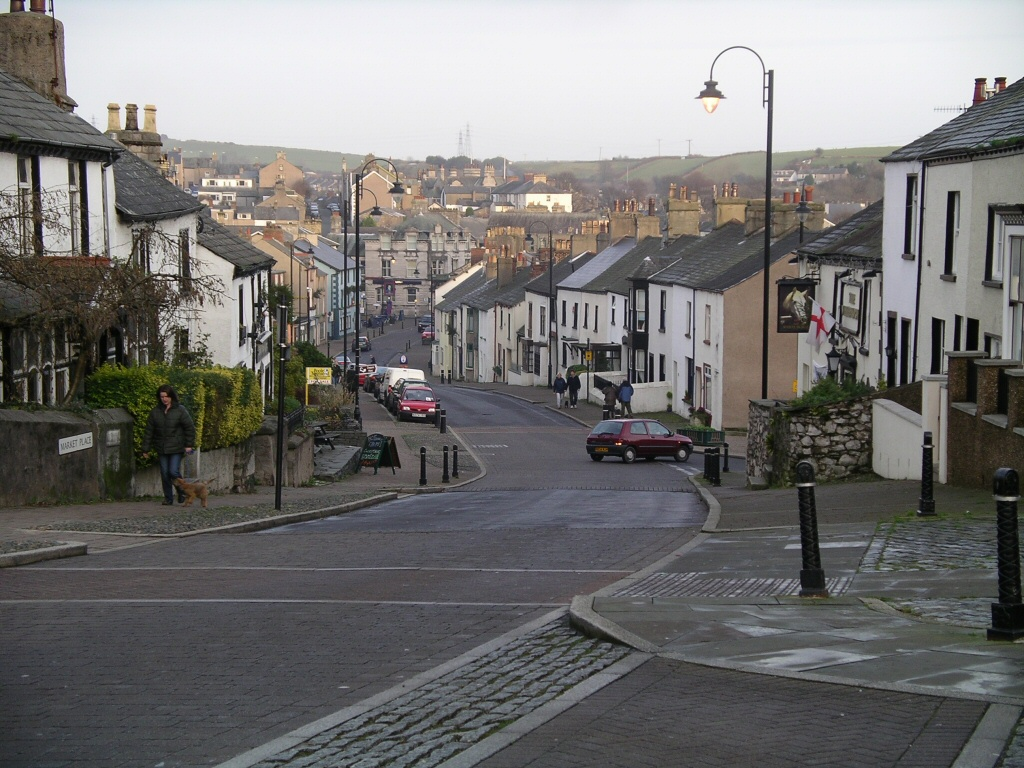 Dalton-in-Furness High Street